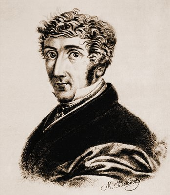 Domenico Gilardi (1785-1845)